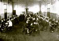 Aula in der Jugendhilfe Johannesburg ca. 1930